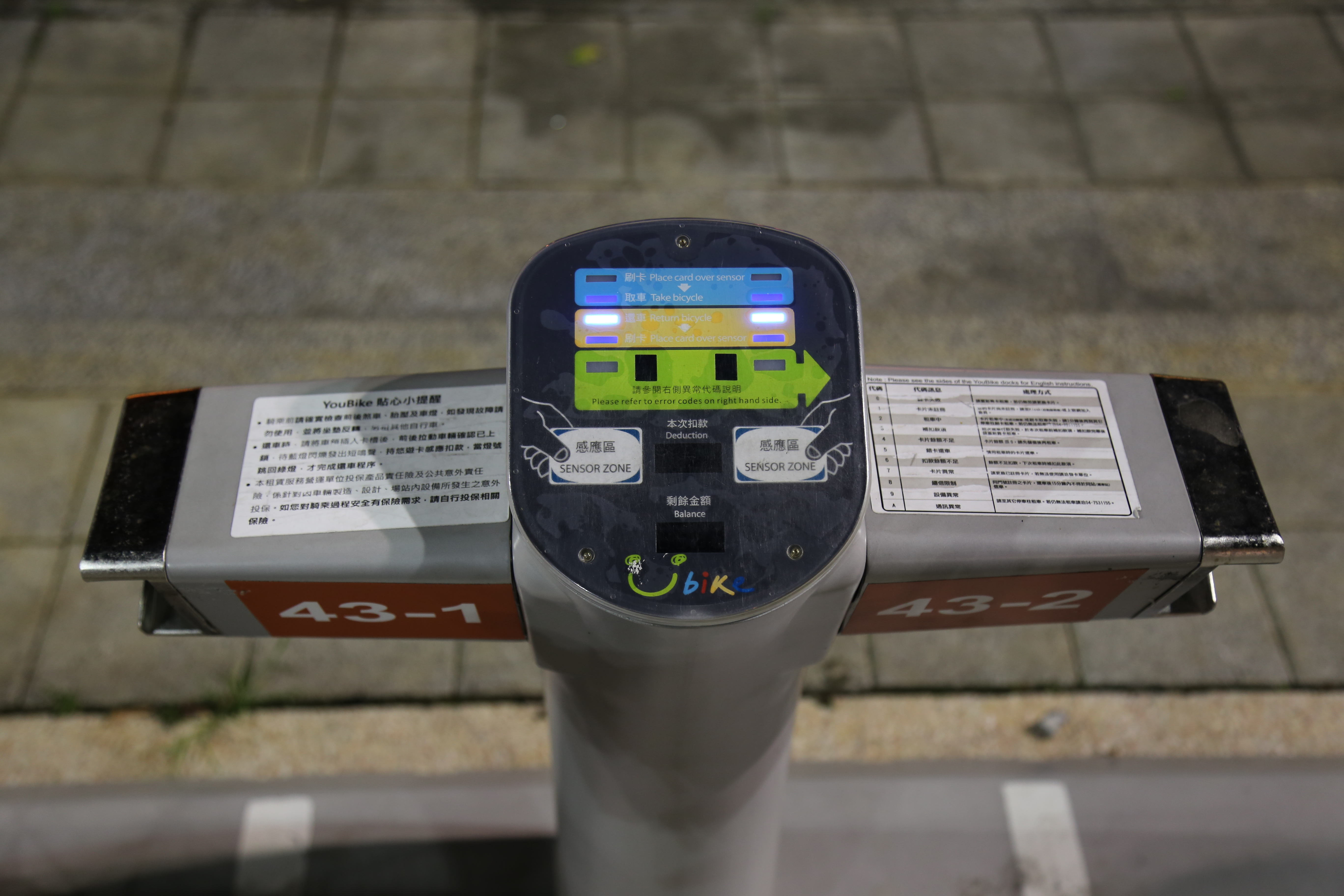 彰化Youbike的服務機